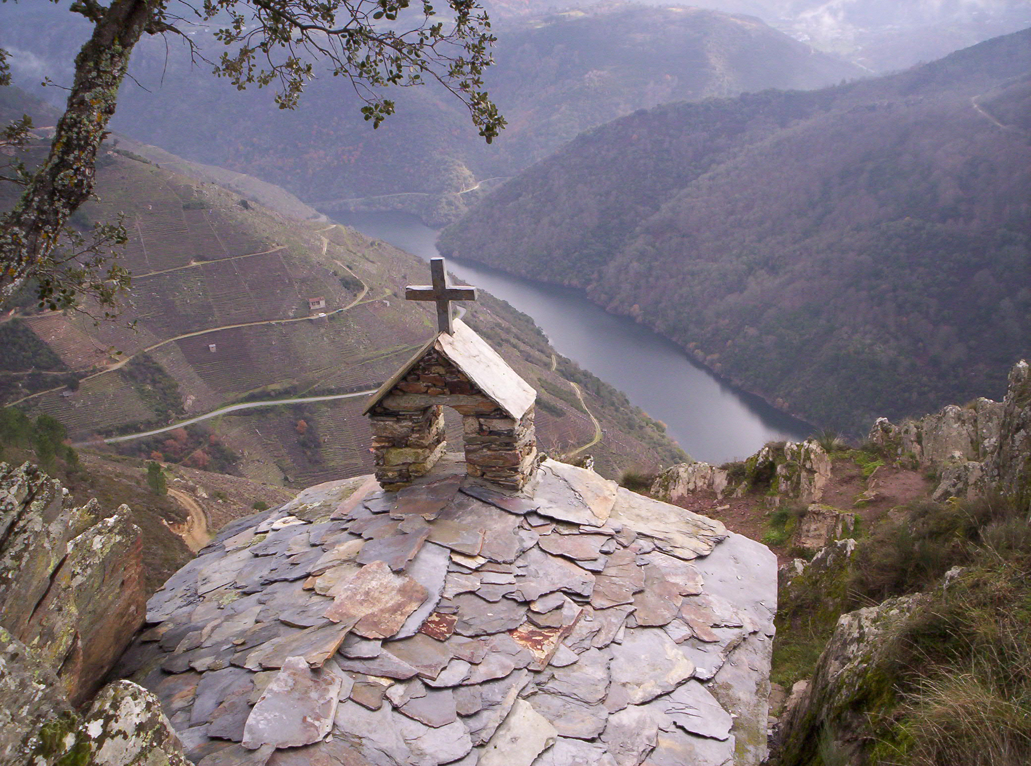 Imaxe dos canóns do Sil. Imaxe tomada dende o concello de Sober.